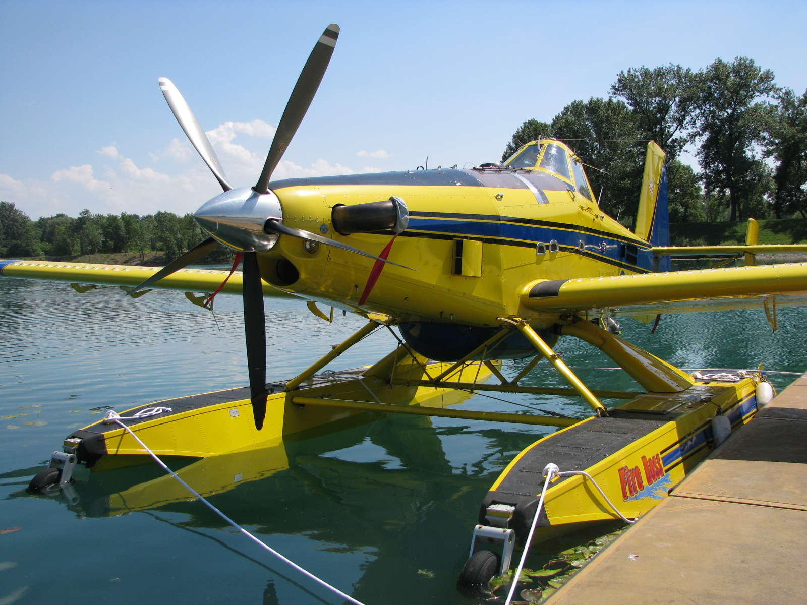 AirTractor AT-802A FireBoss Hrvatskog ratnog zrakoplovstva na Jarunu, Zagreb